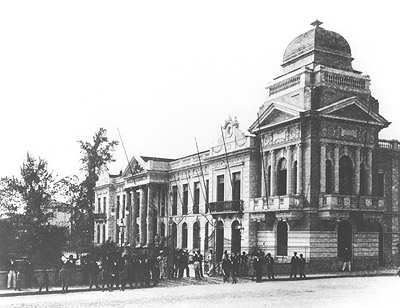 Palácio do Governo. ca. 1898. Matriz-negativo. Gaensly & Lindemann. Acervo do Museu de Arte de São Paulo Assis Chateaubriand (SP).